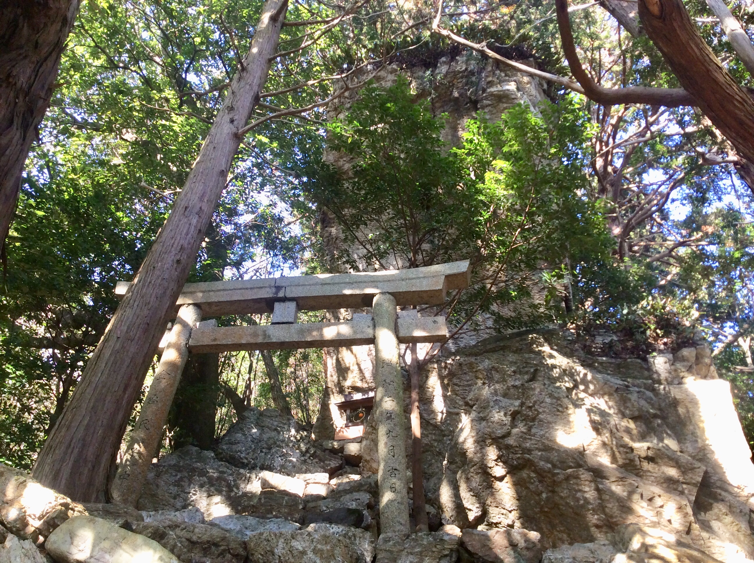 立岩神社（山方比古神社）